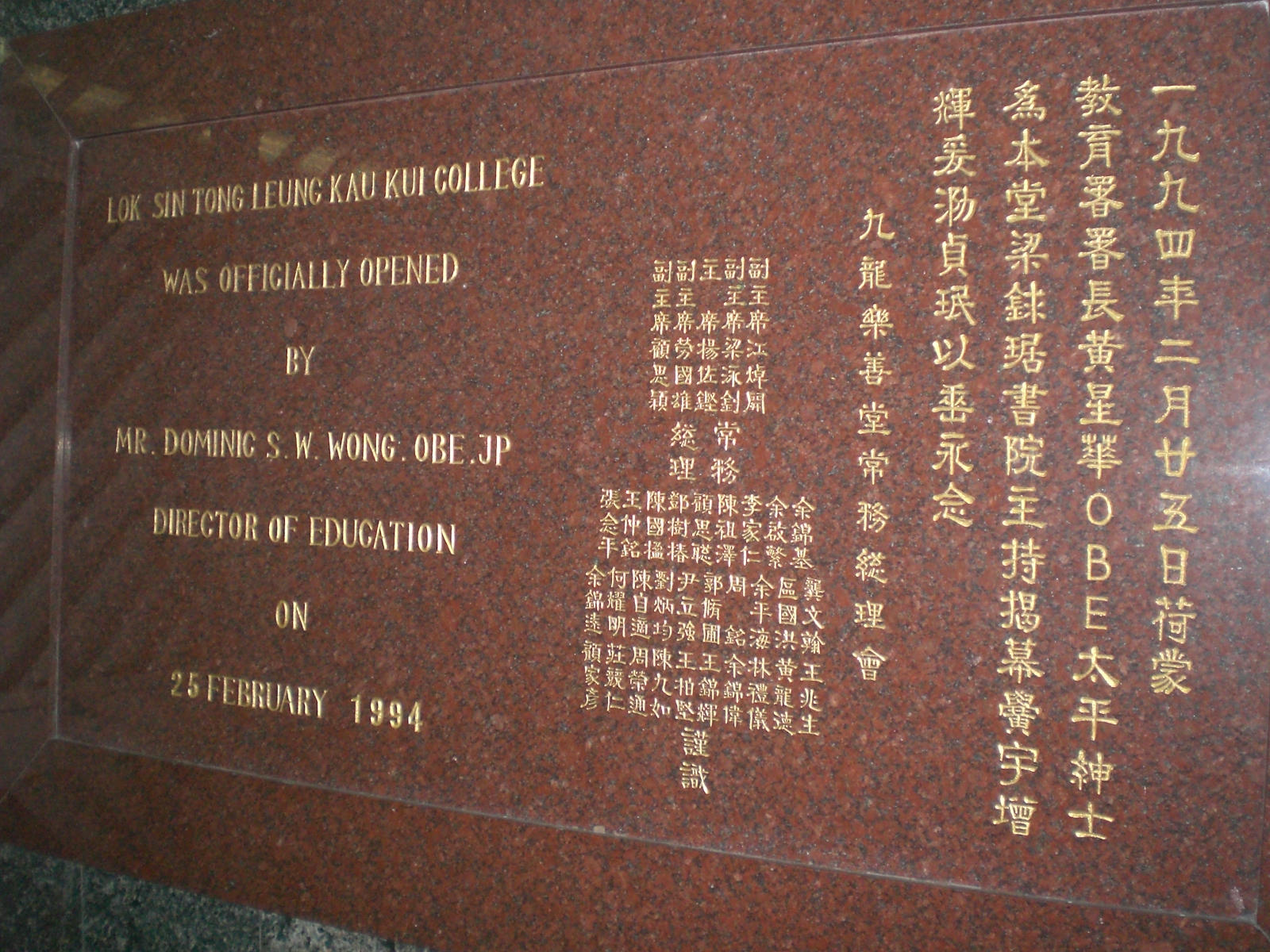 樂善堂梁銶琚書院, 西營盤醫院道